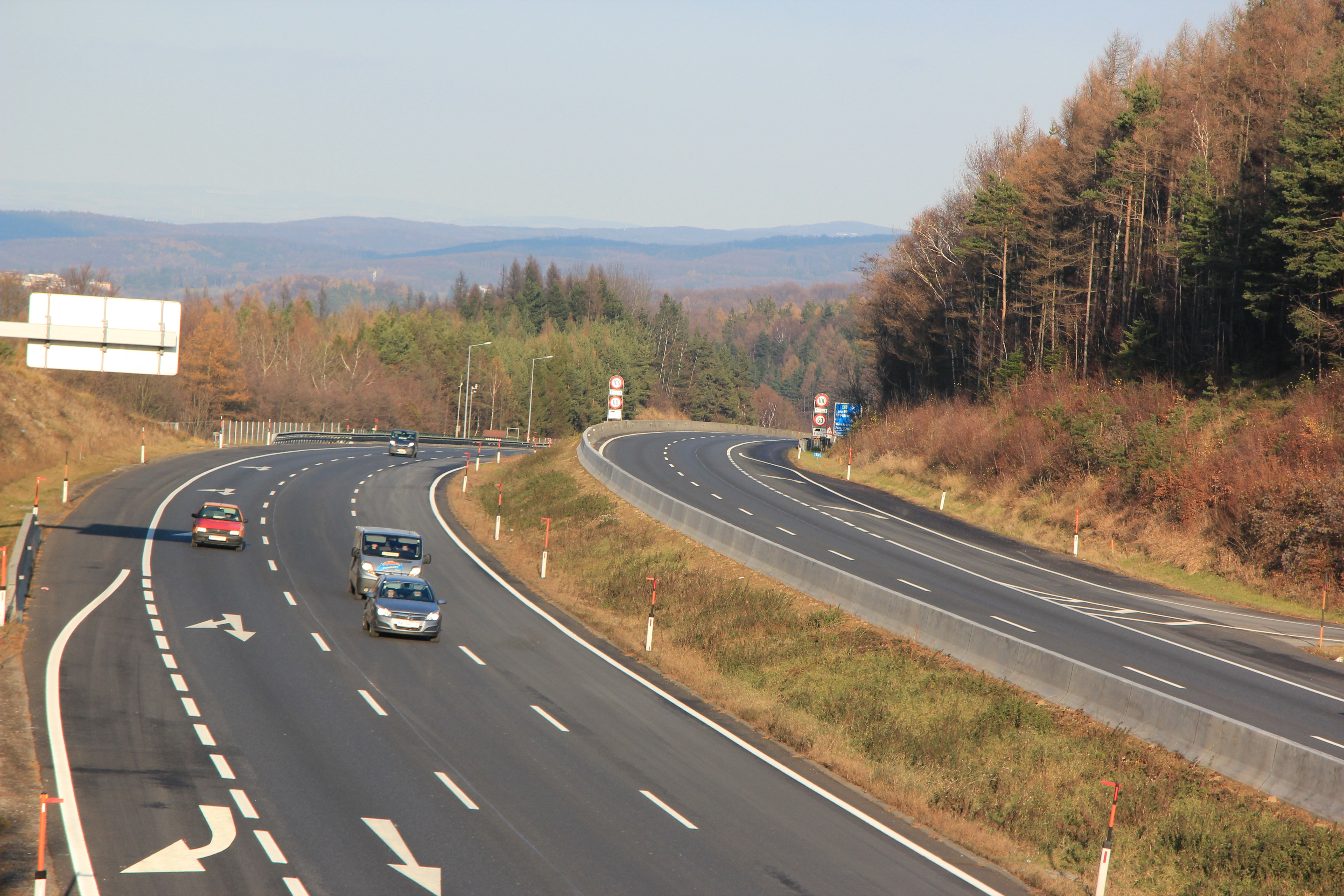 Blick auf die Wiener Außenring Autobahn im Bereich Hochstraß am höchsten Punkt